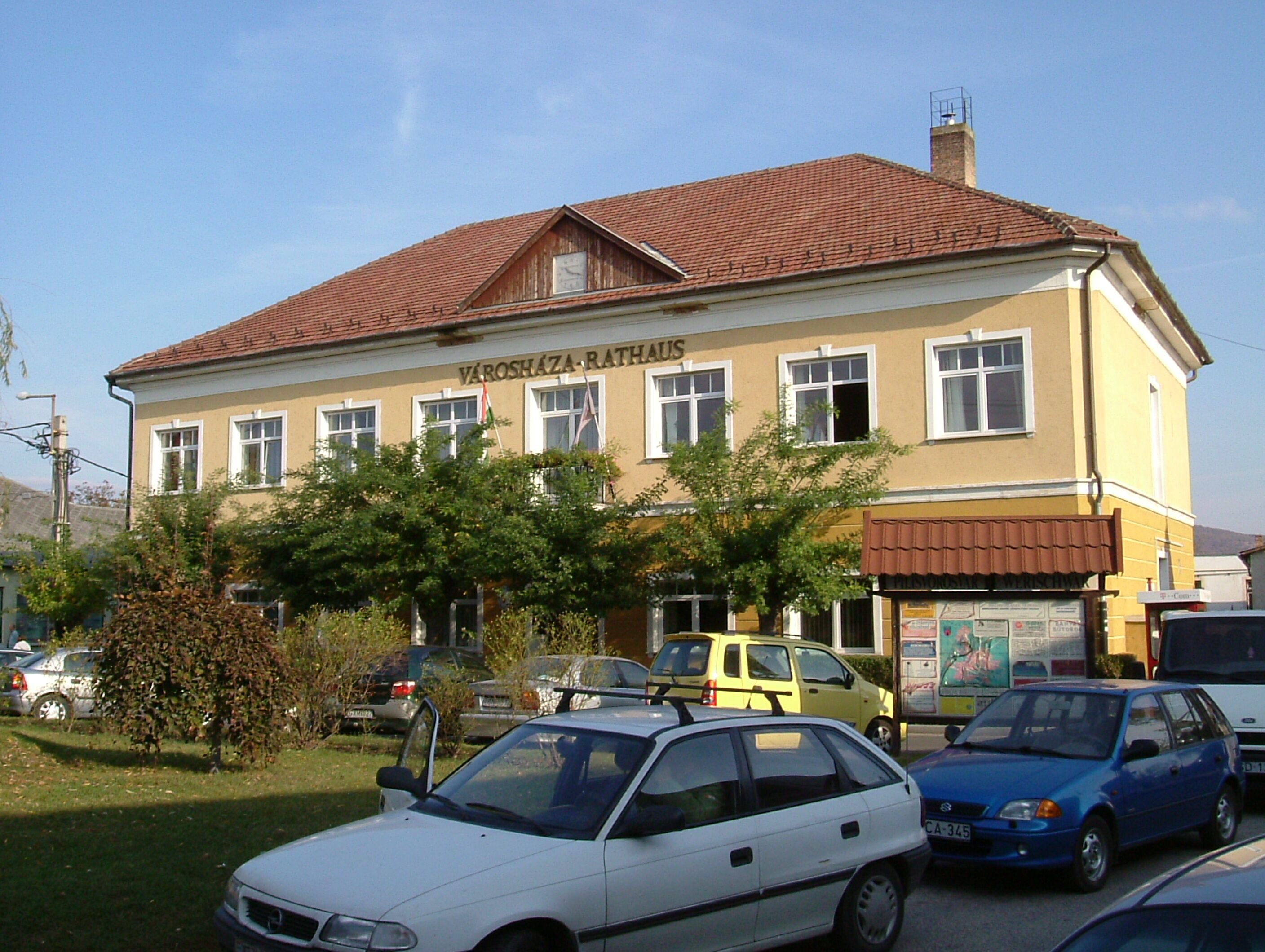 Pilisvörösvár - Hungary. Townhall.